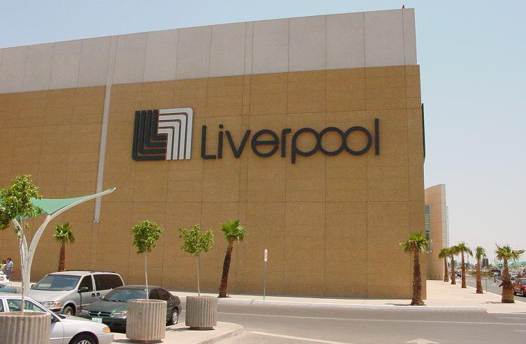 Vista del almacén Liverpool en Galerías Laguna, en la ciudad de Torreón.